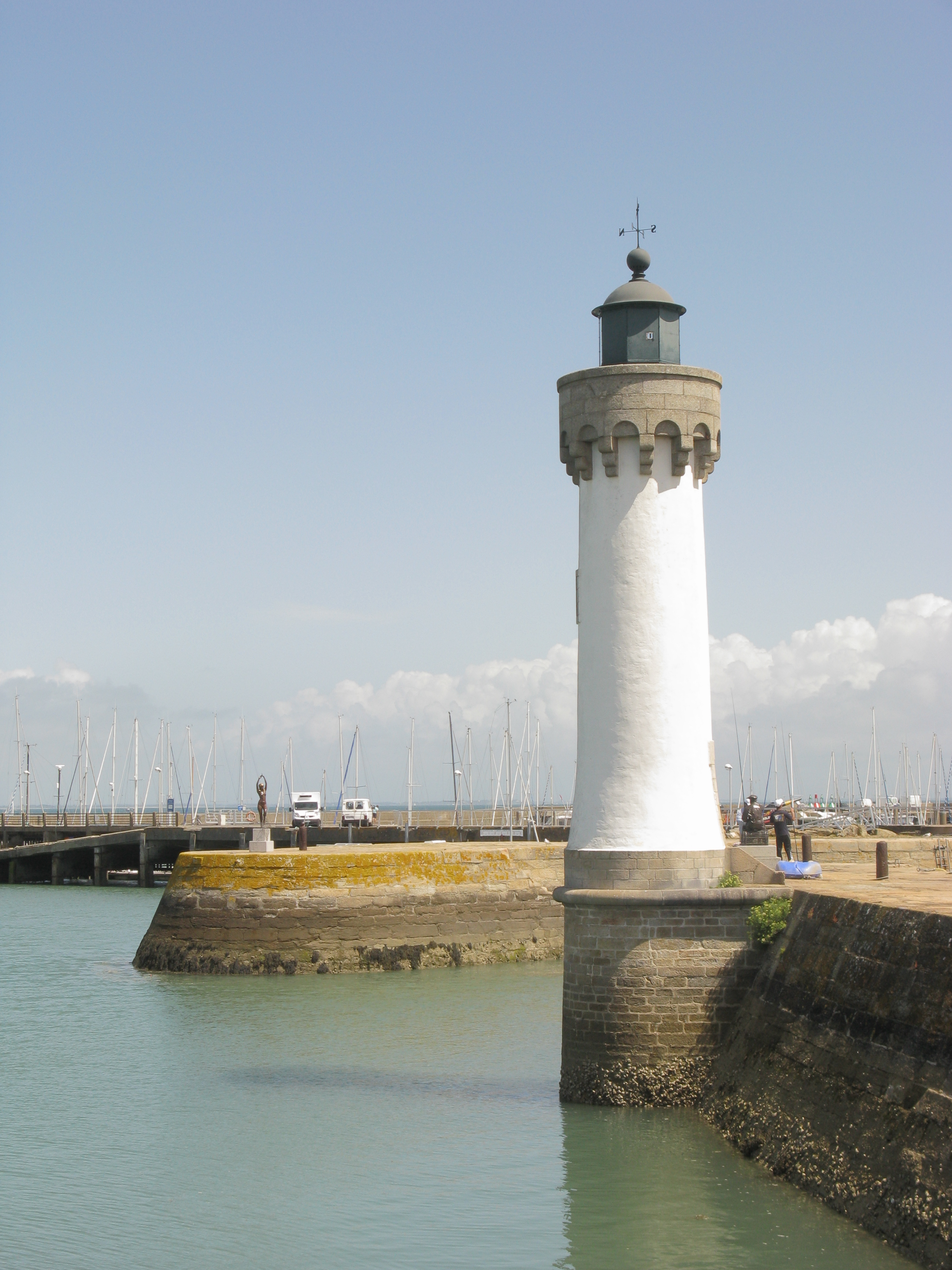 Vuurtoren in de haven Port Haliguen van Quiberon, Bretagne